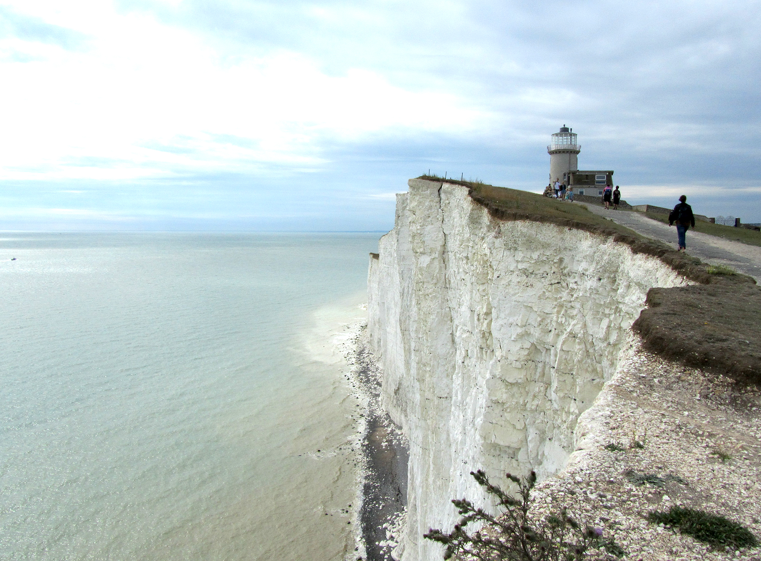 Seven Sisters, Sussex